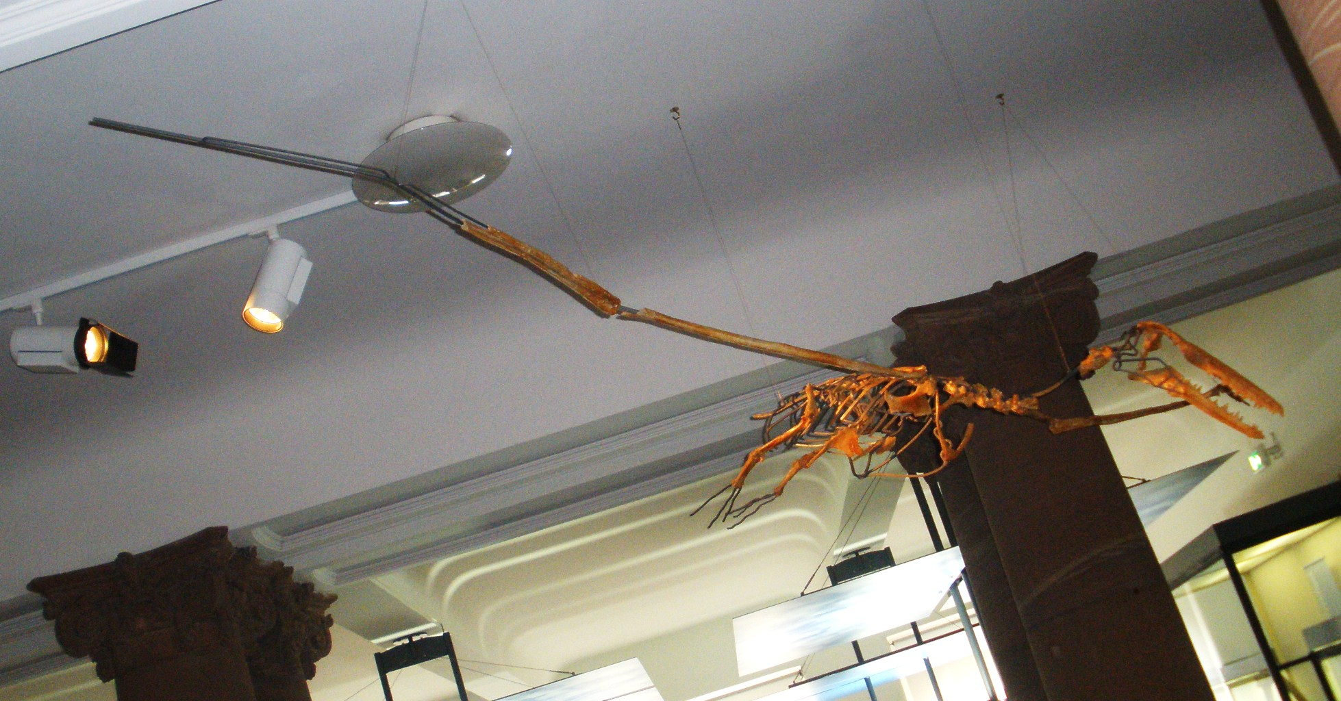 Fossil of Pelagornis, an extinct bird- Took the photo at Senckenberg Museum of Frankfurt